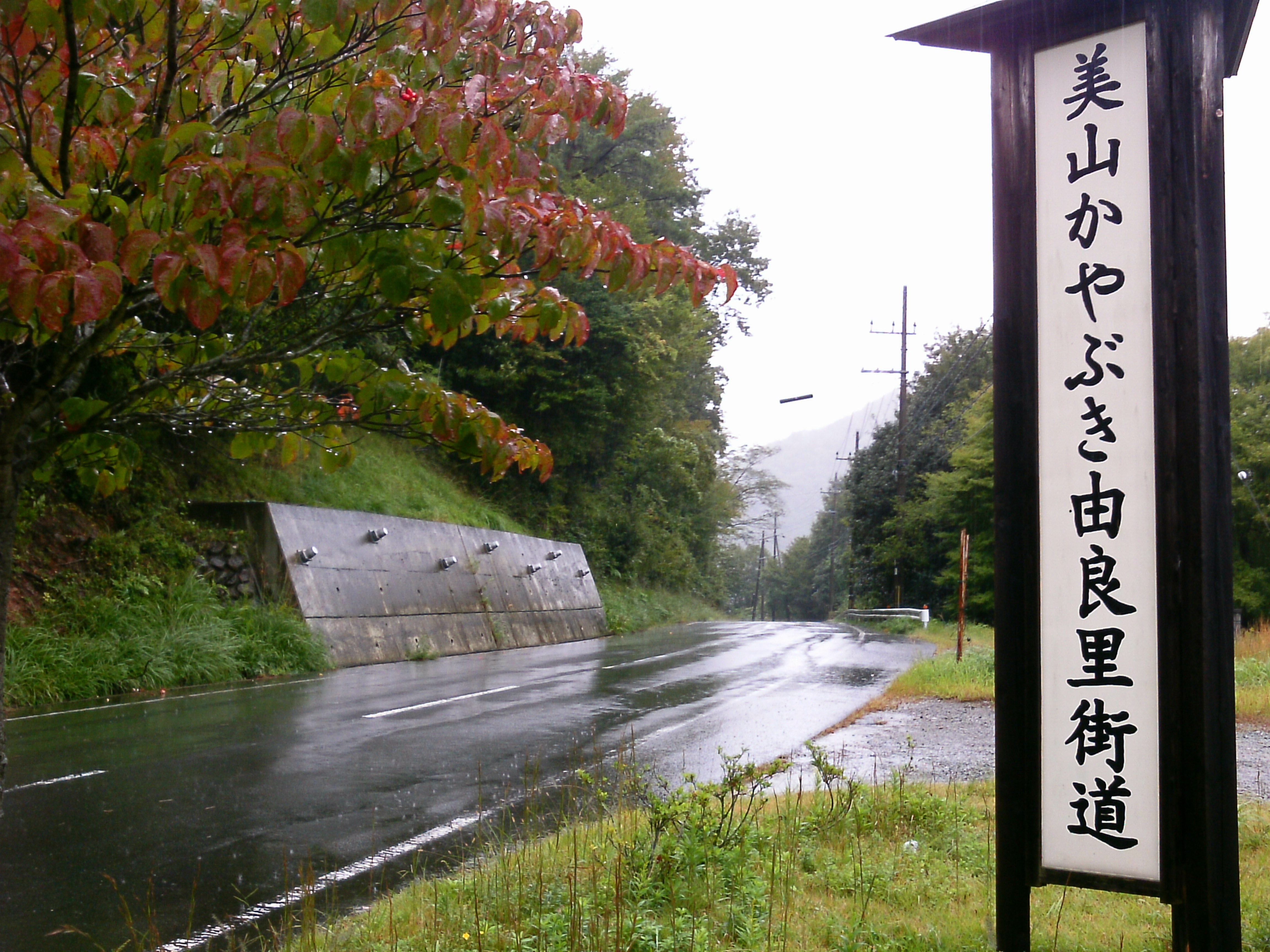 日本風景街道選定の美山かやぶき由良街道の看板、京都府道12号の由良川と並走する京都府道12号綾部宮島線が主対象